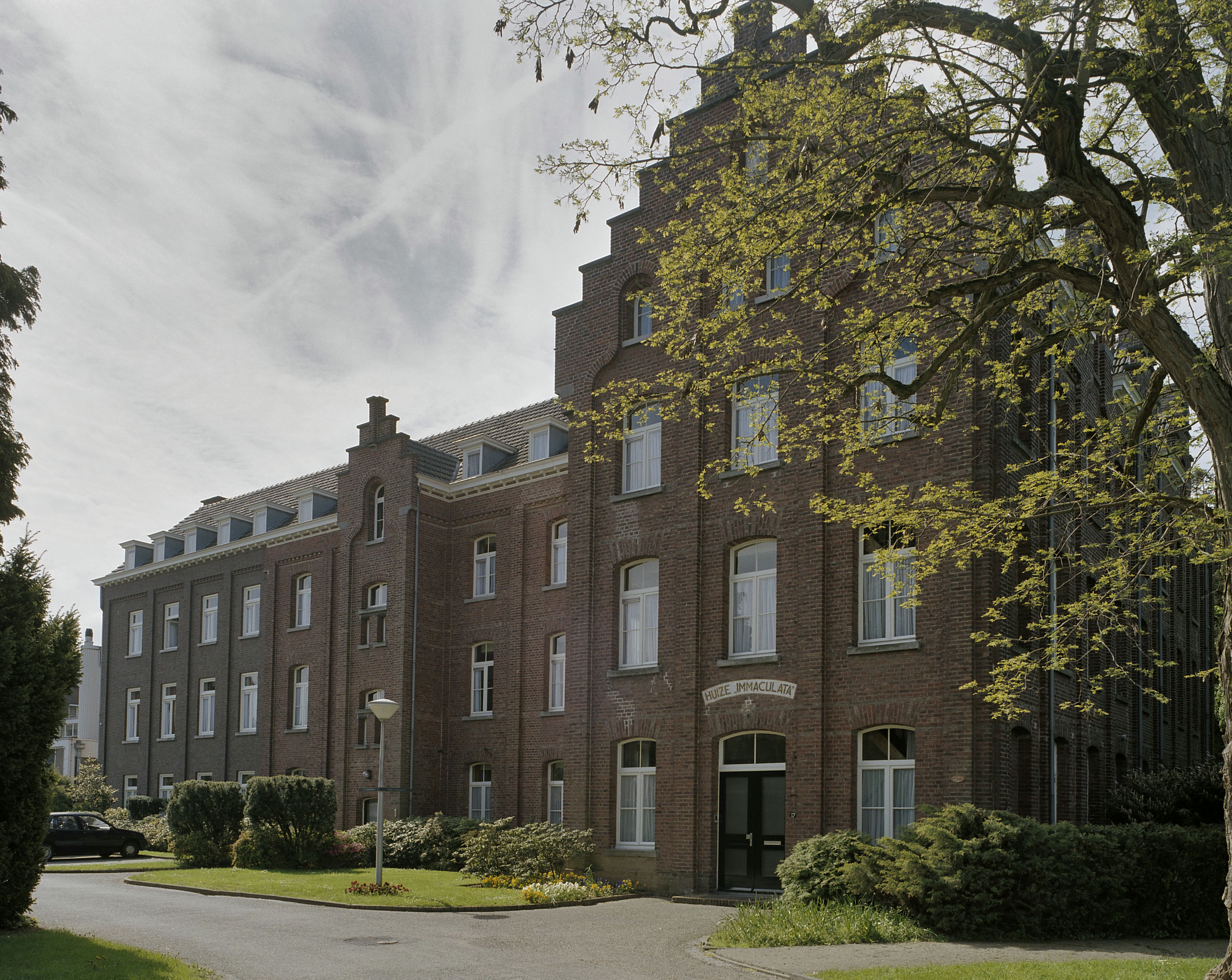 Klooster Rijckholt, Huize Immaculata: Overzicht hoofdgebouw, overzicht voorgevel